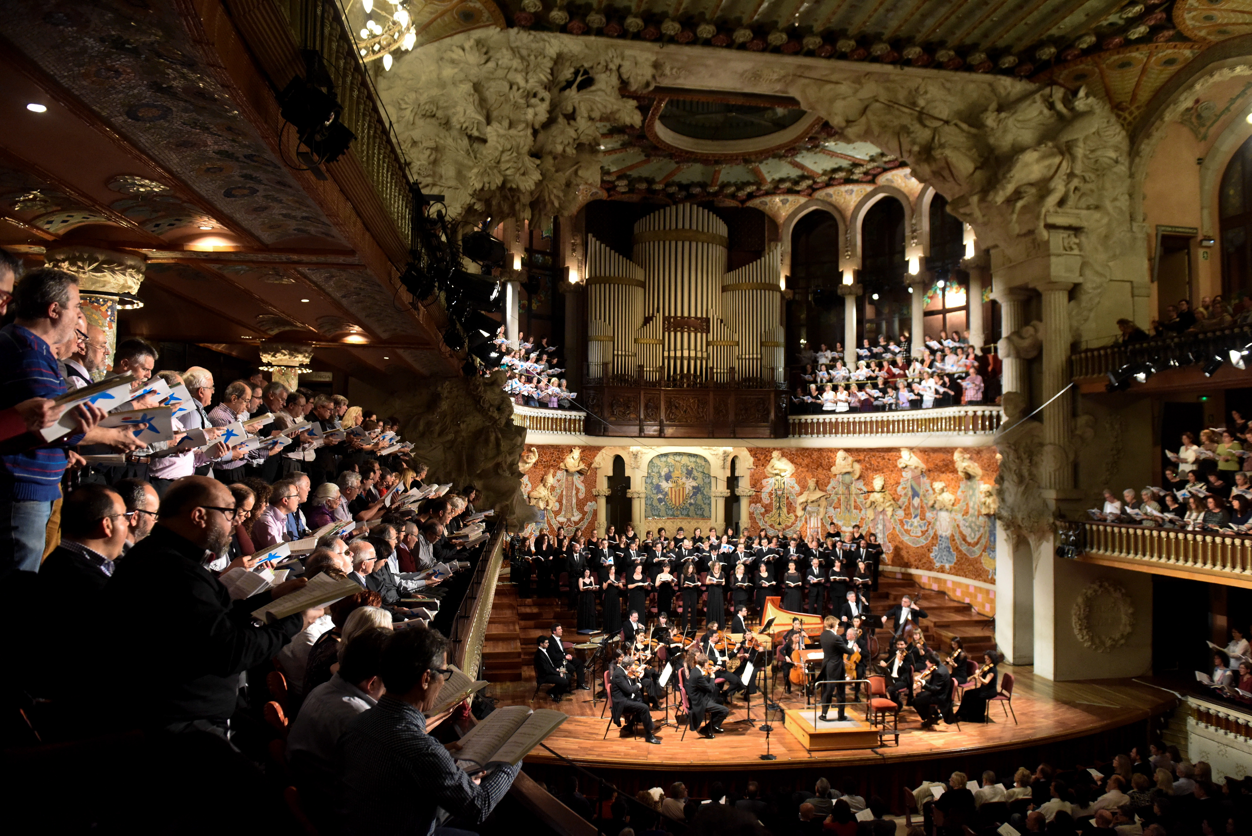 El Mesías Partcipativo celebrado en el Palau de la Música Catalana en diciembre de 2015.